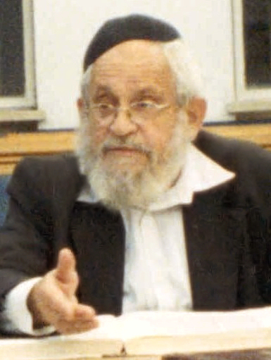 הרב מרדכי ברויאר מעביר שיעור תורה בקהילת בית אריאל בבית וגן